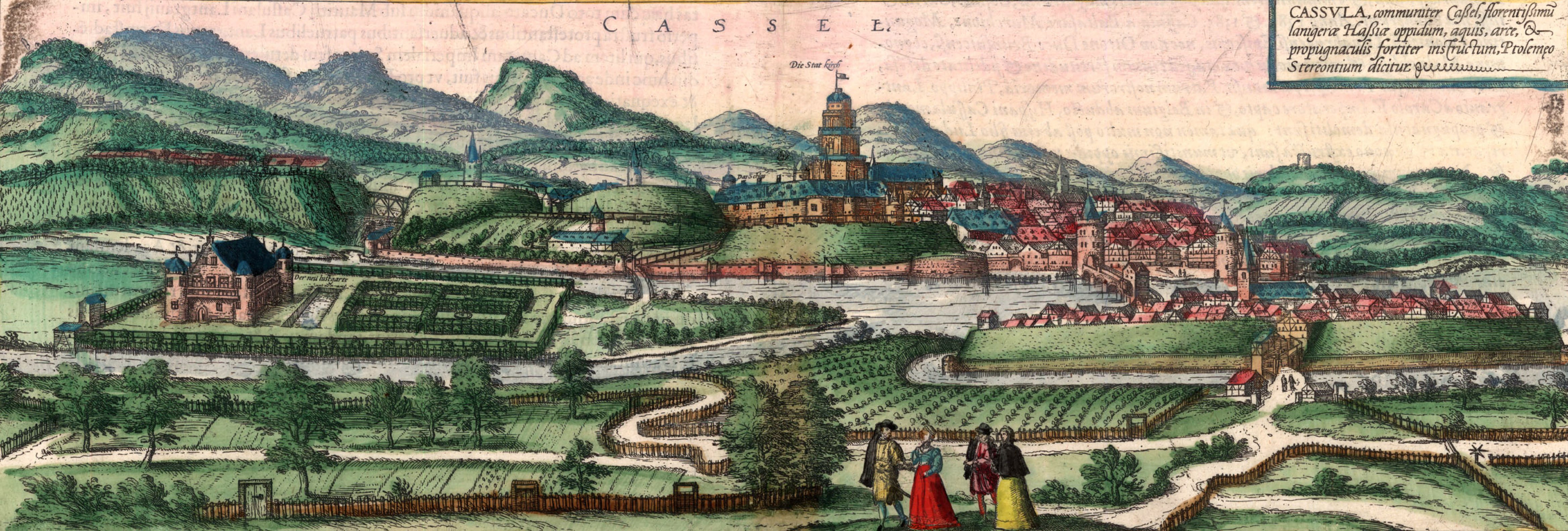 Eine Stadtansicht Kassels aus dem Jahr 1572